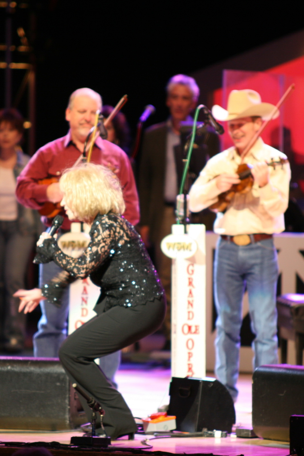 Jeannie Seely